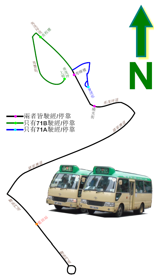 中文（香港）: 九龍專線小巴71系列路線的走線圖